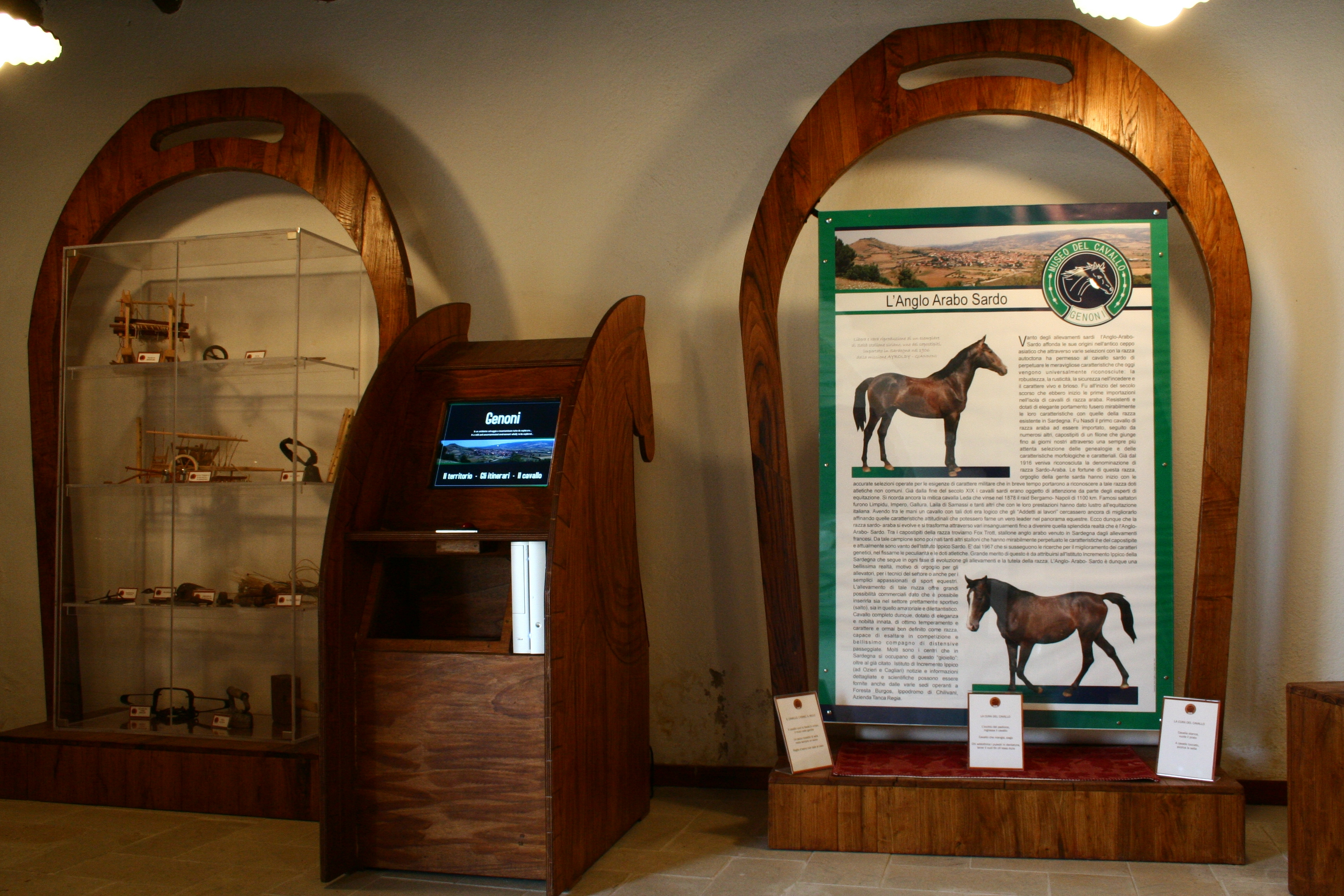 Totem e pannelli didascalici.